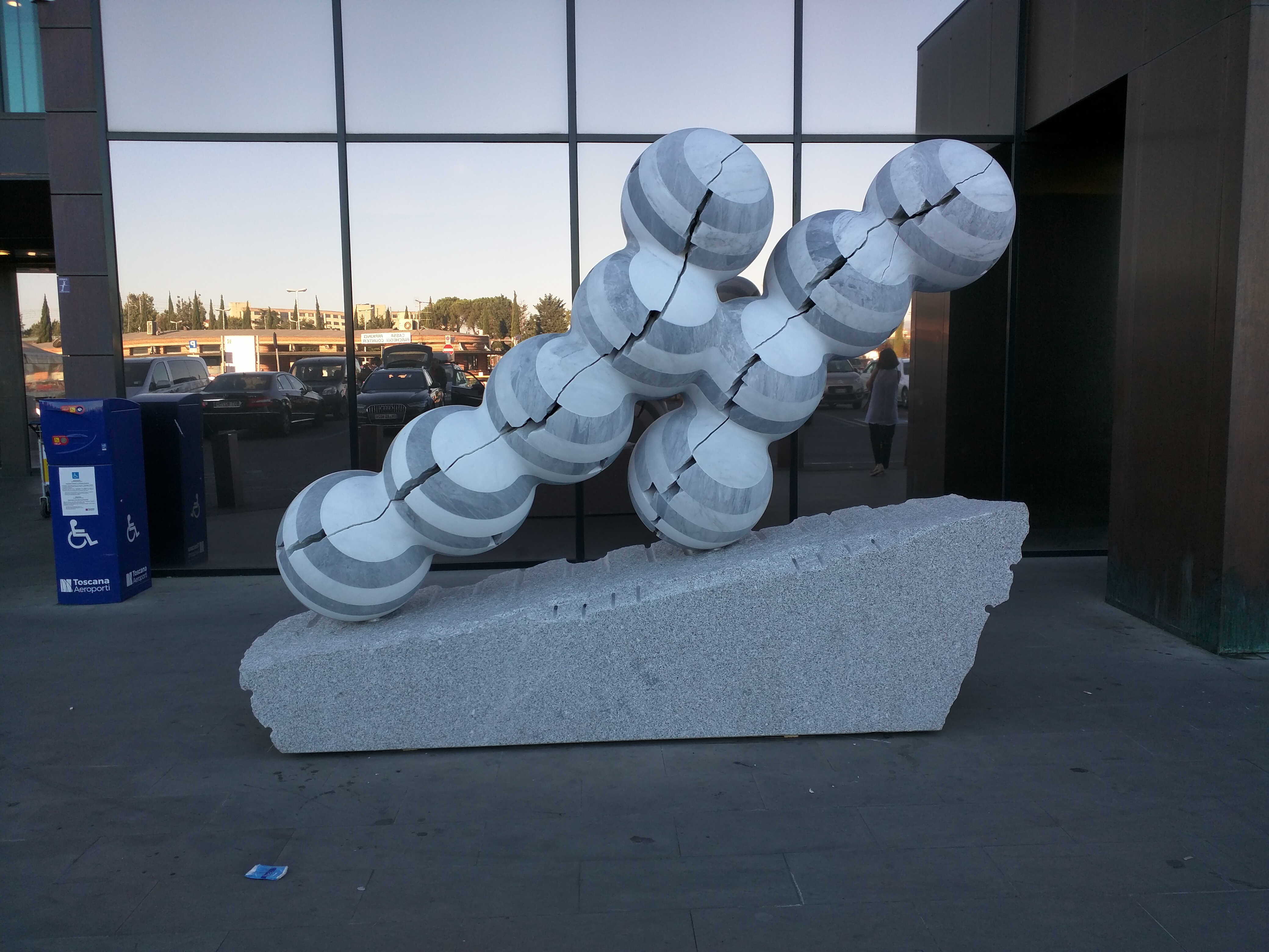 statua di Park Eun Sun, aeroporto di Firenze